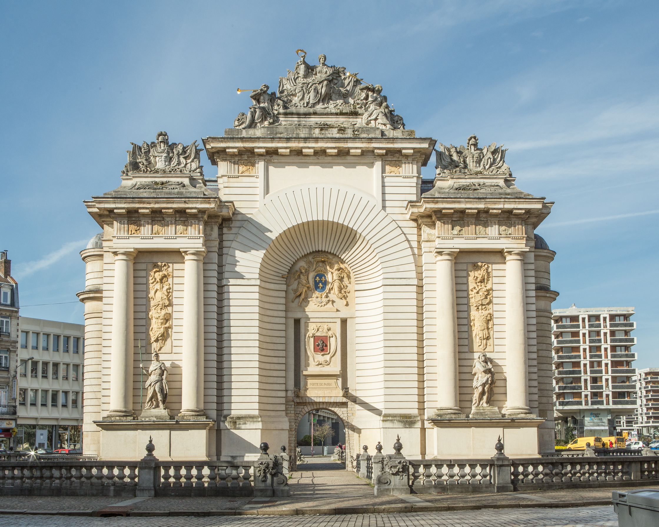 Porte de Paris, Rijsel